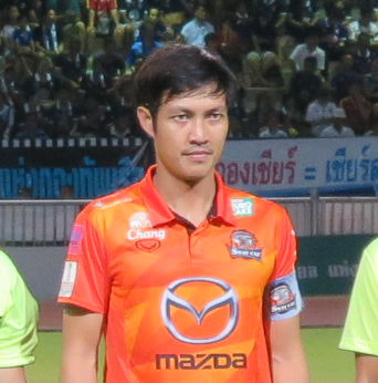 Chalermpong Kerdkaew